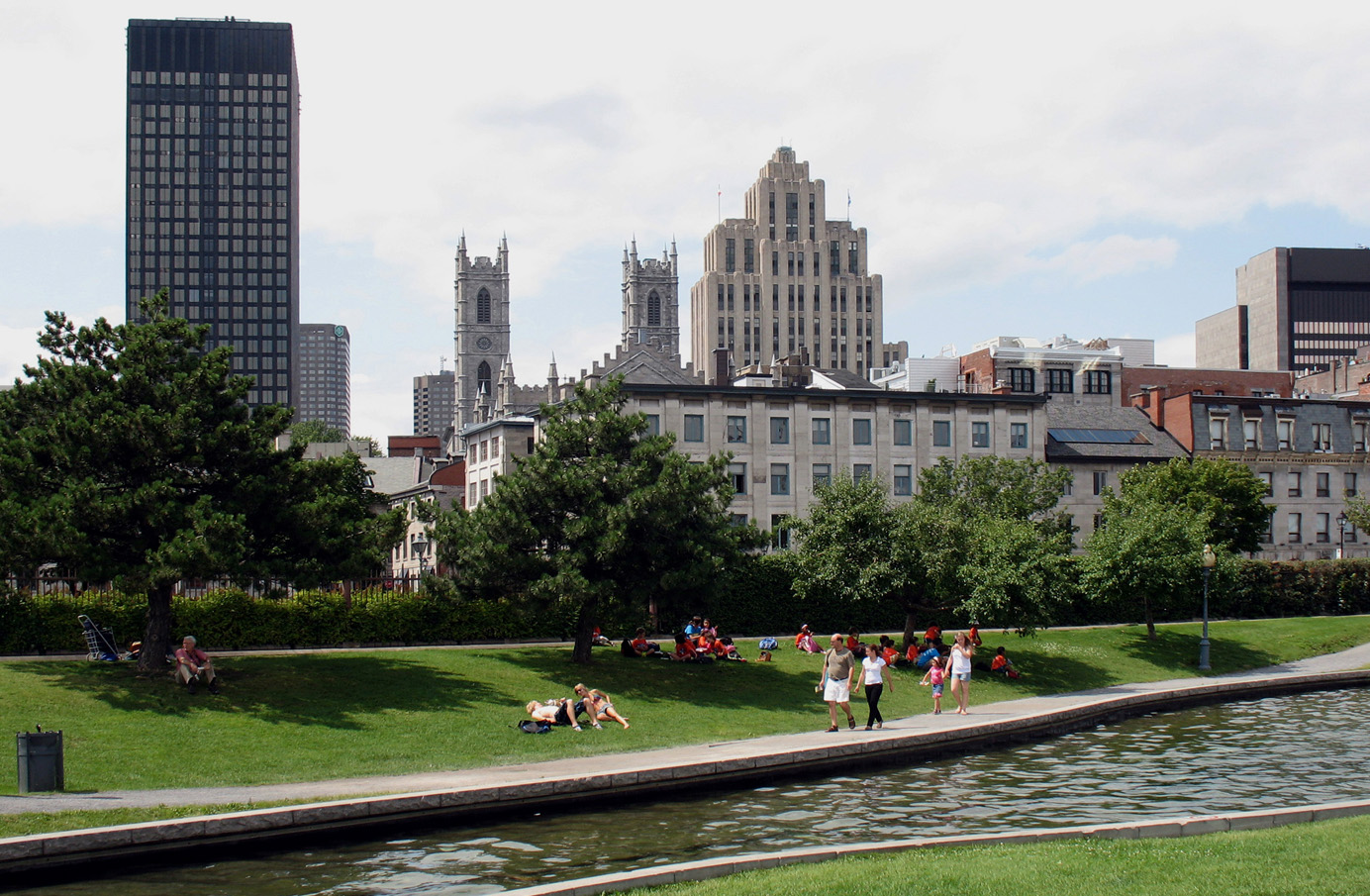 Vieux-Montréal vu du Vieux-Port, Montréal, Canada. On aperçoit, au centre, la basilique Notre-Dame de Montréal et l’édifice Aldred.